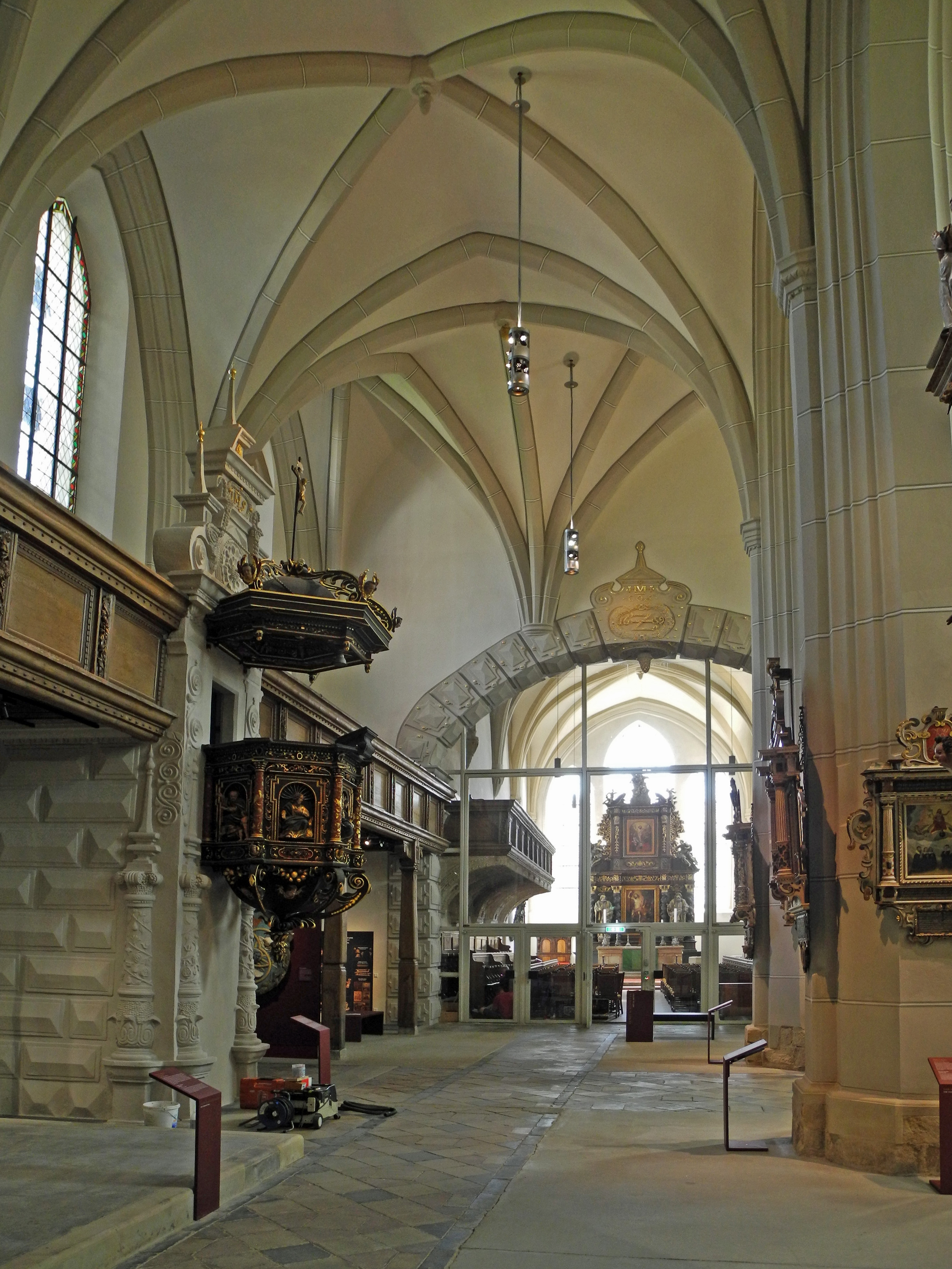 Interieur der Klosterkirche St. Peter und Paul des ehem. Franziskanerklosters Zittau mit Säulen und Epitaphen